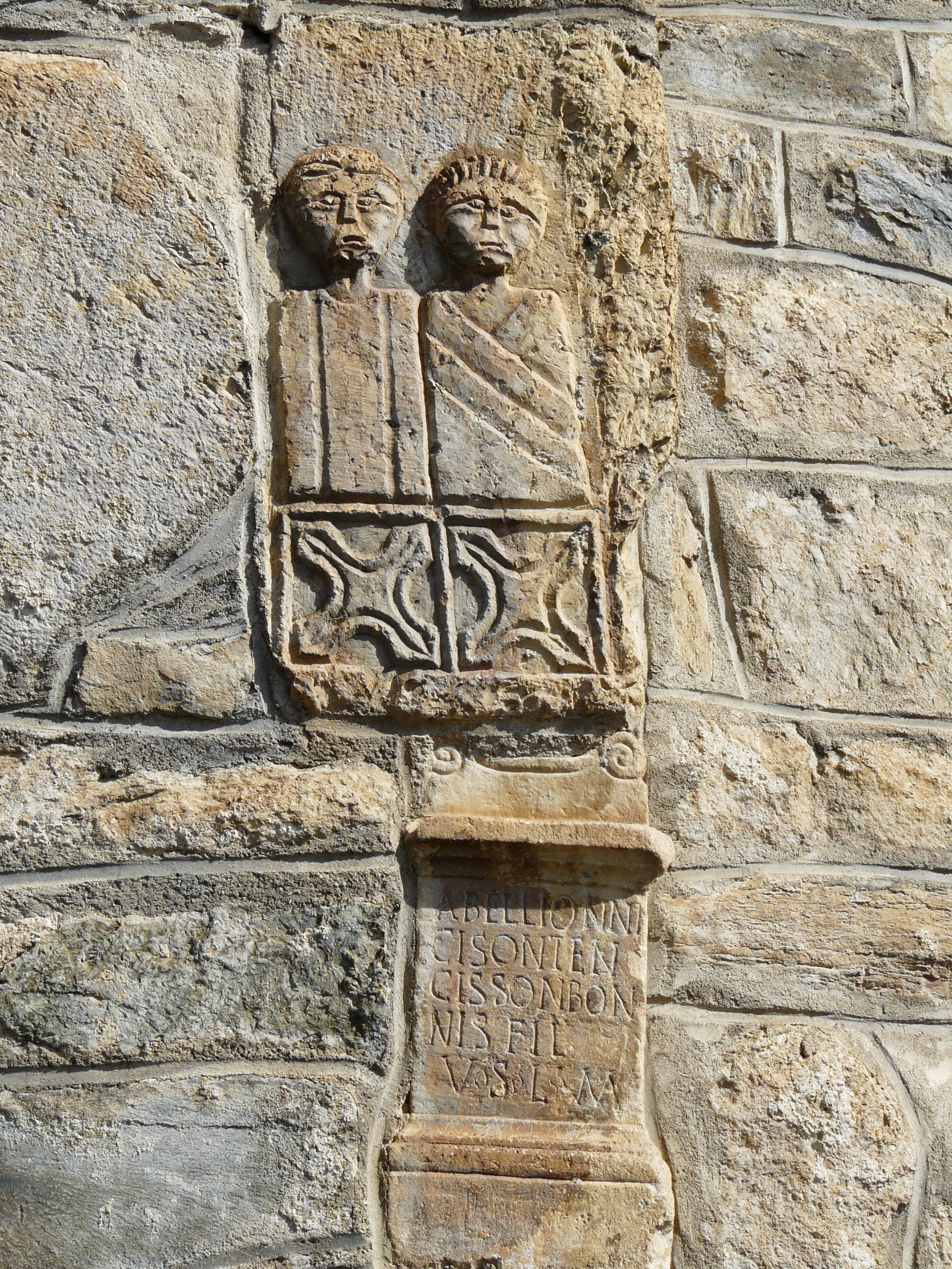 Cippe funéraire en remploi àl'église de Saint-Aventin (Haute-Garonne, France).